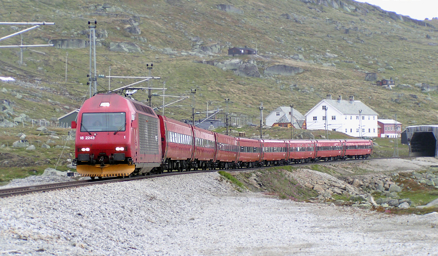 El18.2243, Finse, Norway